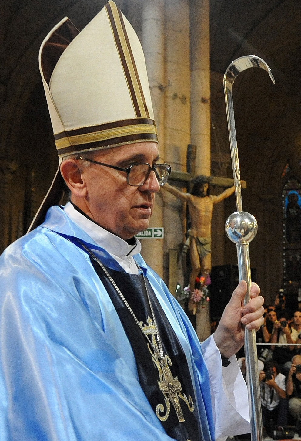 Misa en conmemoración de la mediación papal por el conflicto del Canal de Beagle, en la Basílica de Luján